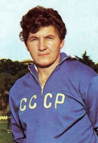 CAMPIONI dello SPORT 1970/71-n.43- CHIZHOVA - ATLETICA LEGGERA -Rec